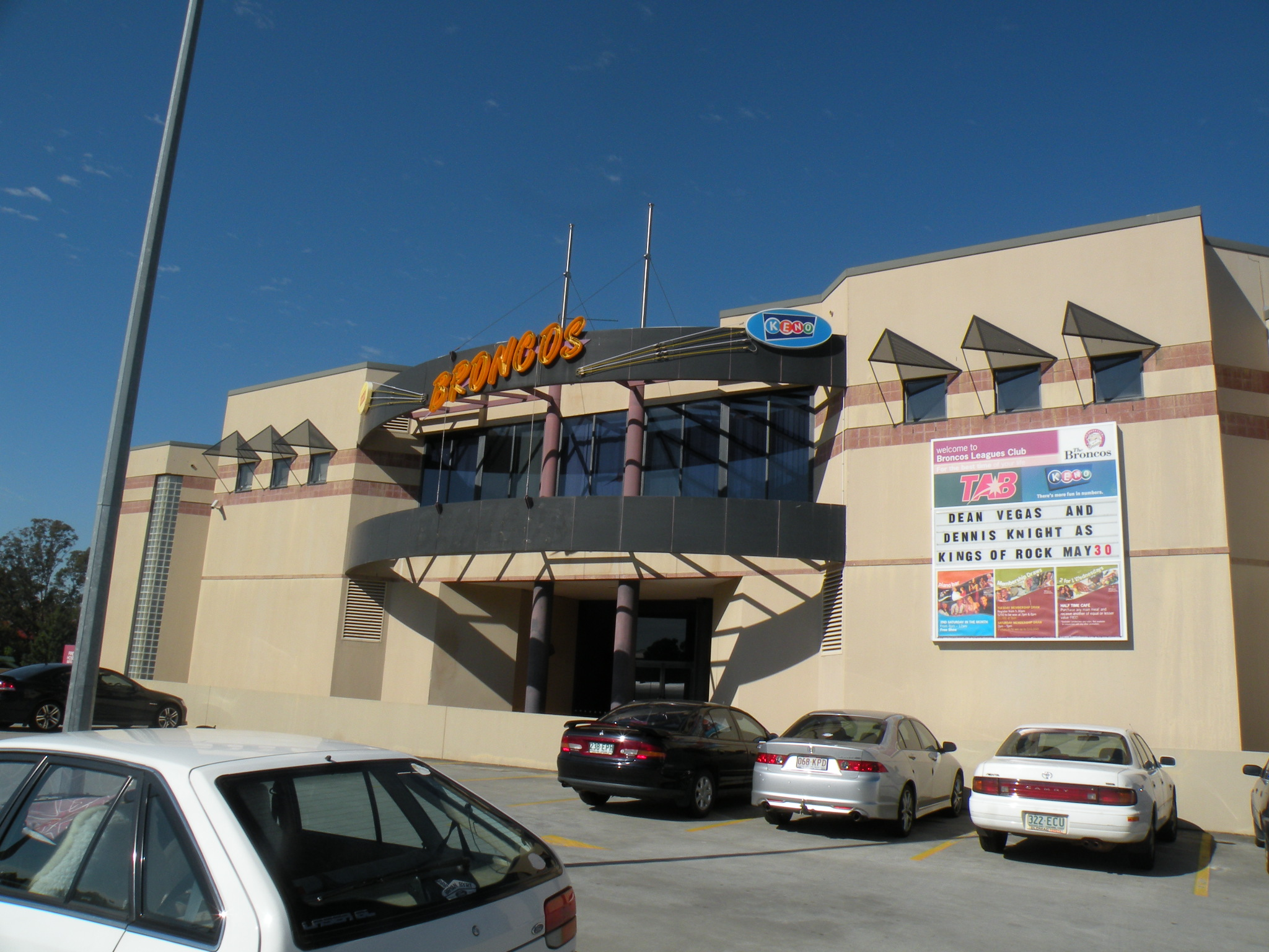 Entrée des Broncos